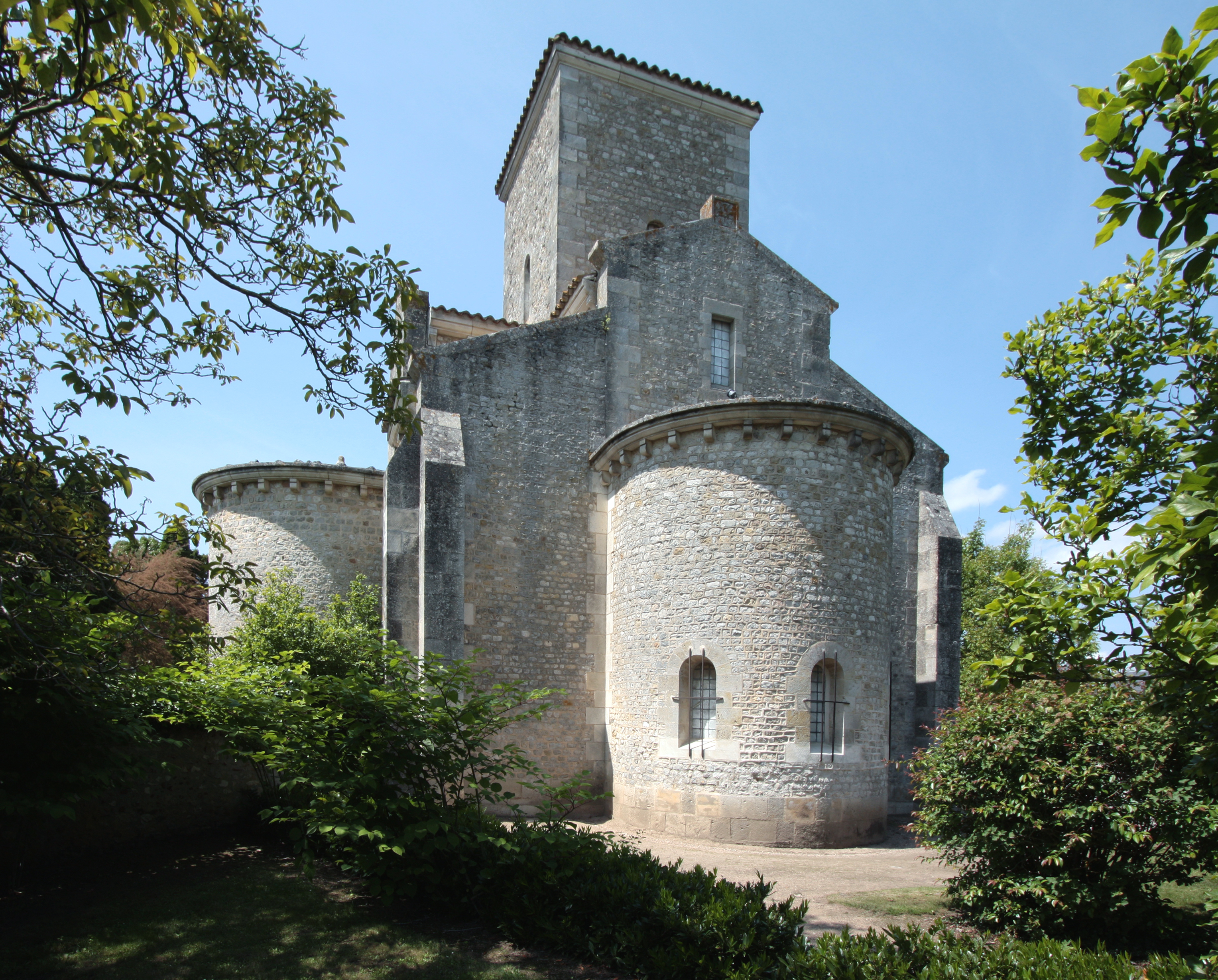 Basilica Germigny Des Prés - romanic choir